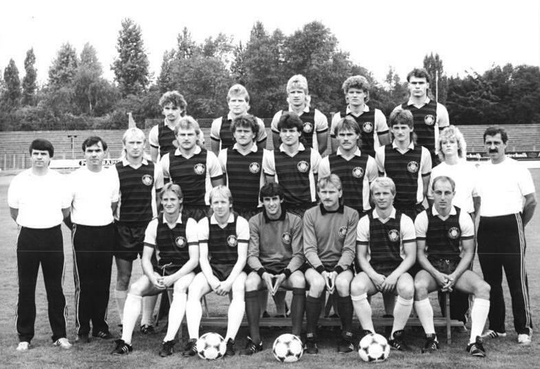 ADN-ZB-Kluge-21.11.88-ma-Leipzig: Fußball-Oberliga-Saison 1988-89. Die Mannschaft des 1. FC Lok Leipzig: Hintere Reihe v.l.n.r.: Heiko Scholz, Hans-Järg Leitzke, Matthias Lindner, Torsten Kracht und Andre Barylla. Mitte v.l.n.r.: Hans Ullrich Thomale (verantw. Trainer), Wolfgang Fichtner (Mannschaftsleiter), Matthias Liebers, Uwe Zötzsche, Olaf Marschall, Matthias Zimmerling, Bernd Hobsch, Frank Edmond, Dorit Kamprad (Physiotherapeutin) und Gunter Böhme (Assistenztrainer). Vorn v.l.n.r. Ronald Kreer, Uwe Bredow, Rene Müller, Joachim Niklasch, Dieter Kühn und Frank Baum.